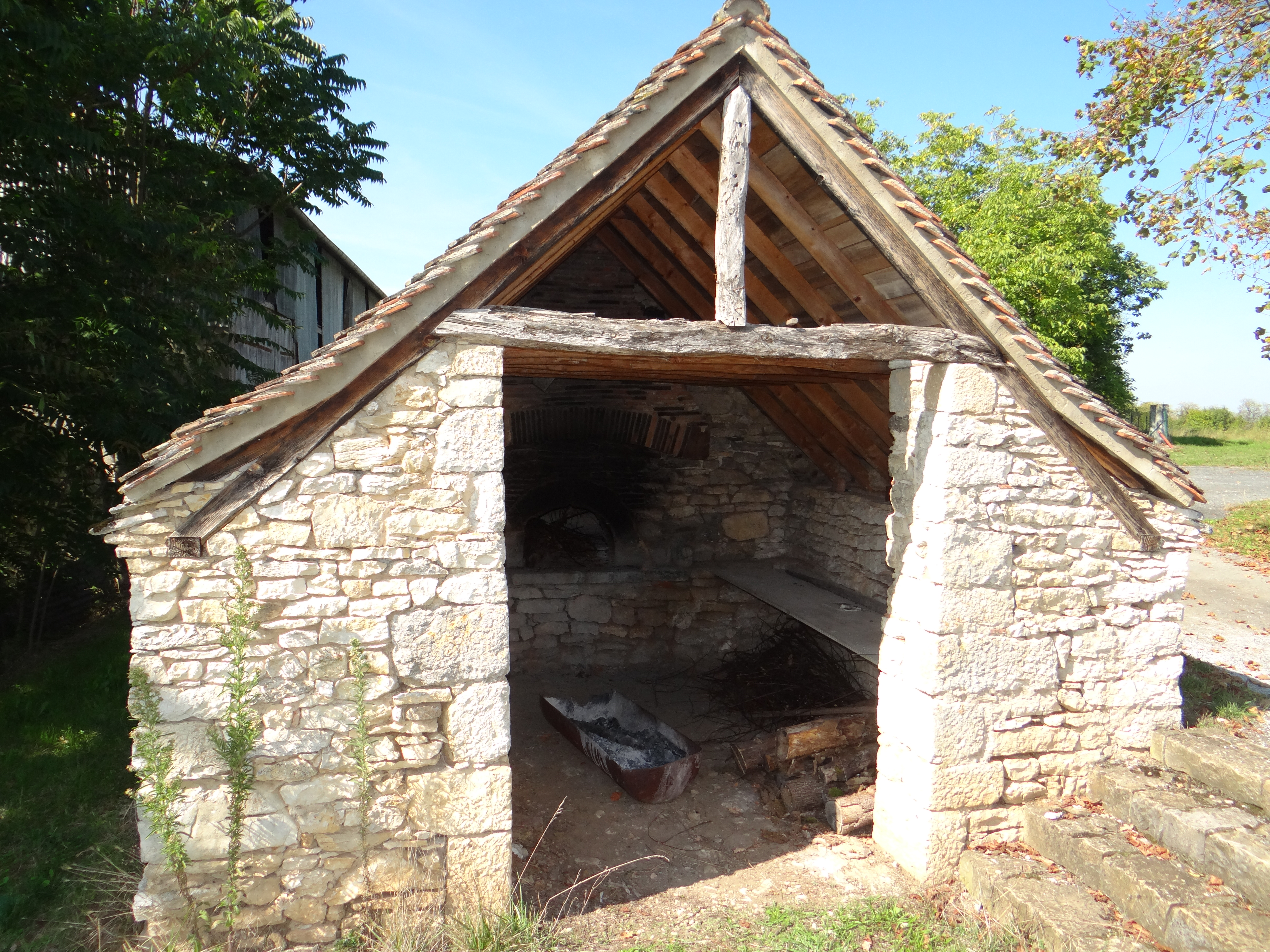 Four banal ou communal à Mayrac (Lot, France)